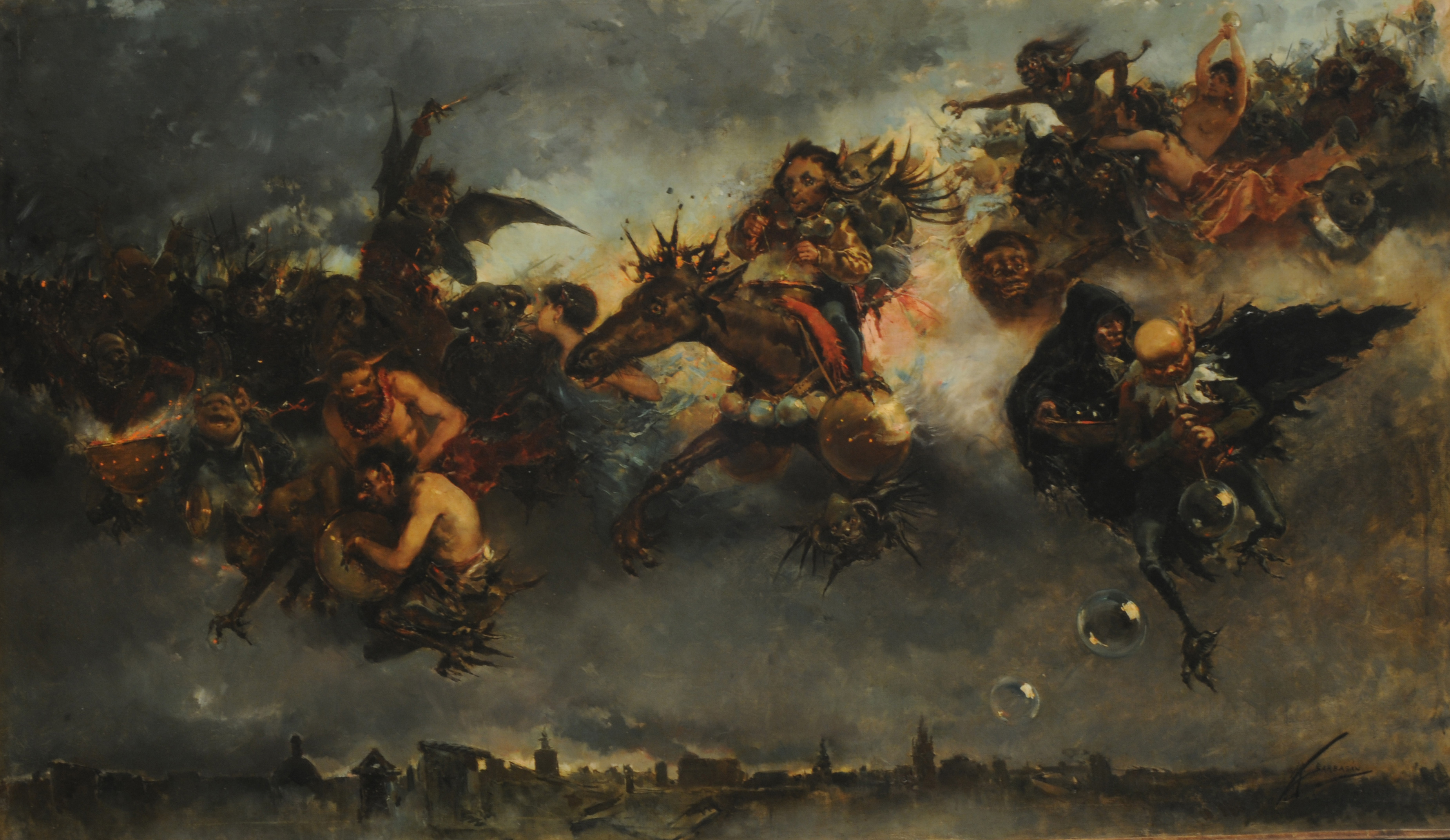 Noche de Valpurgis o La noche de Walpurguis.